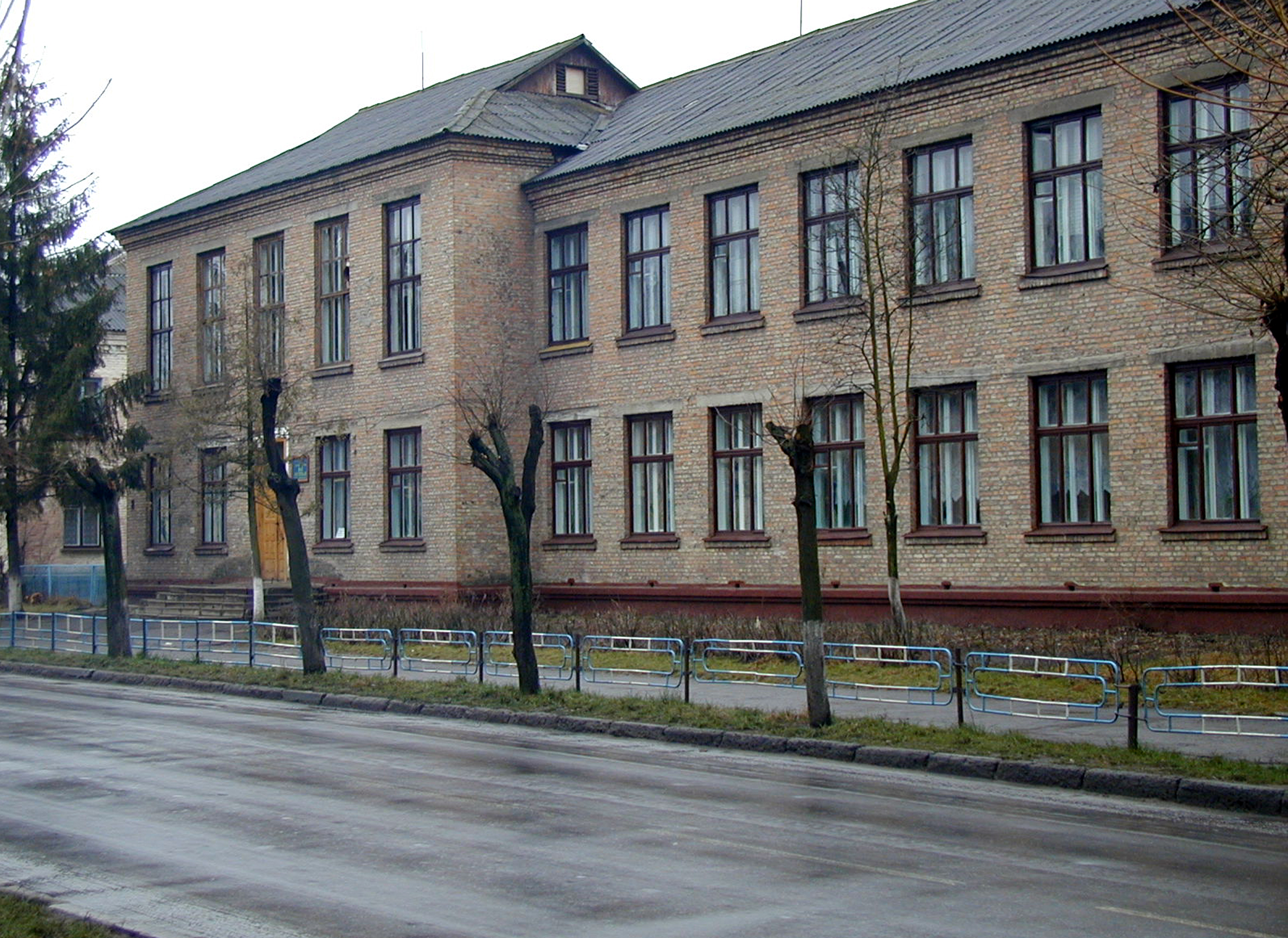 Споруда колишньої російської гімназії (мур.), Ковель, вул. Театральна, 21